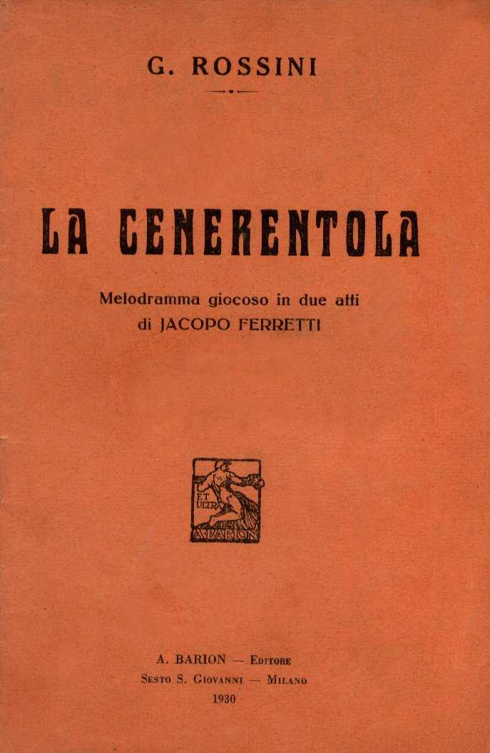 Copertina libretto "La Cenerentola" melodramma giocoso in due atti di Jacopo Ferretti musica di G. Rossini - editore Attilio Barion Sesto San Giovanni - Milano 1930